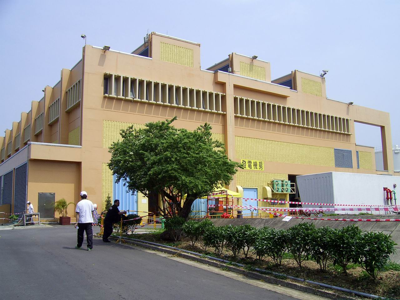 沙田污水處理廠發電機房